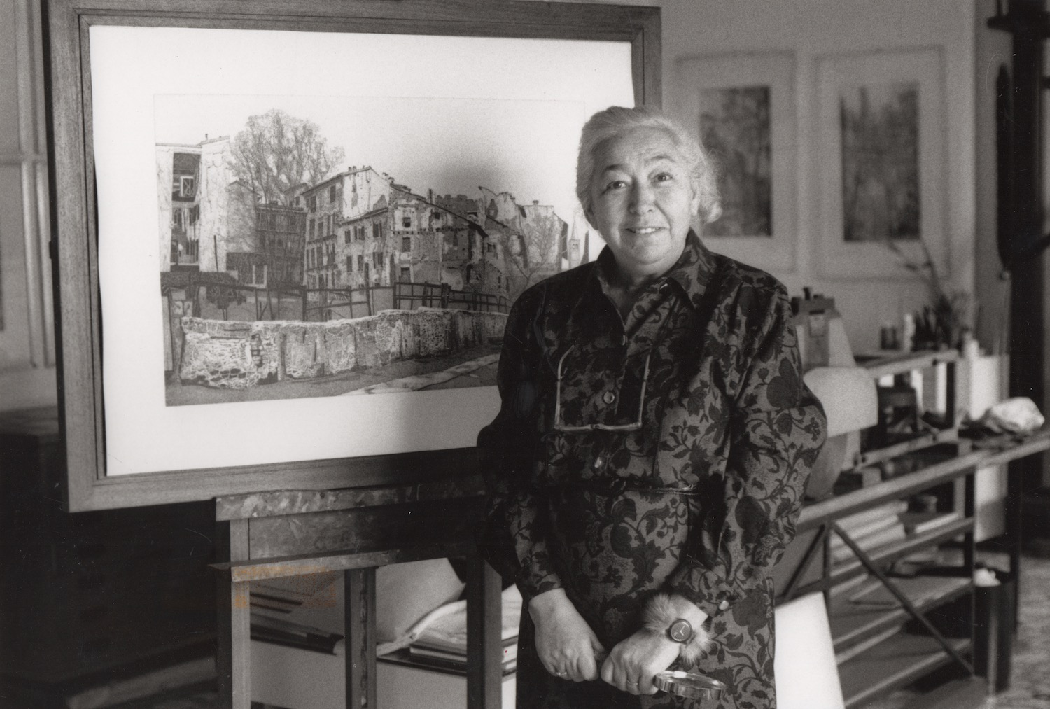 Ritratto dell'artista